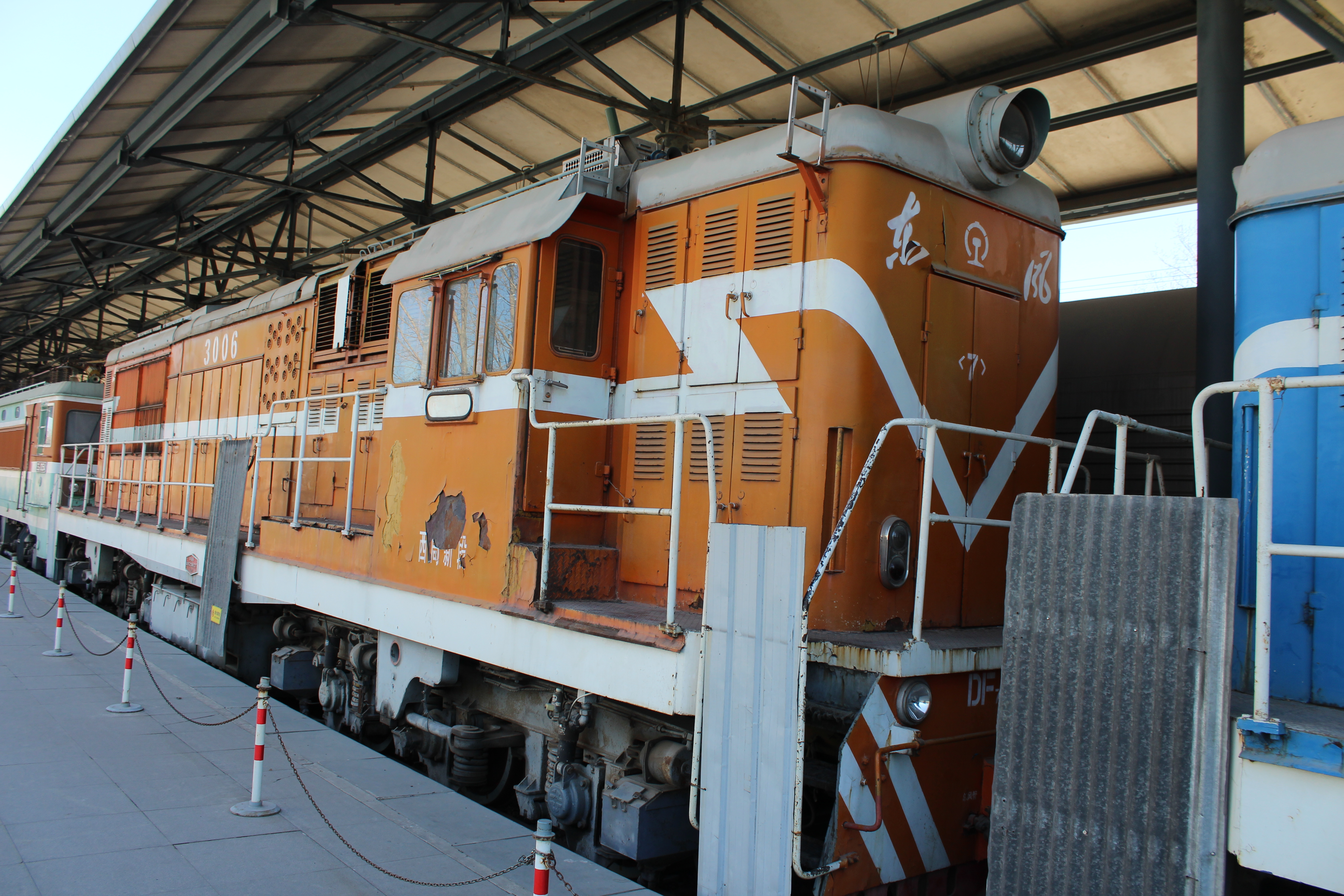 保存于中国铁路博物馆东郊馆的DF7B-3006号机车